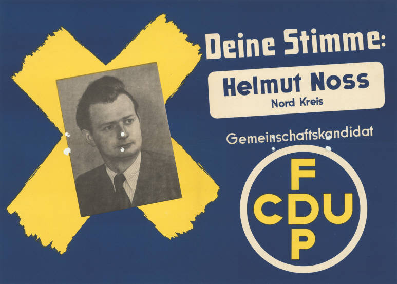 Deine Stimme: Helmut Noss Nord Kreis Gemeinschaftskandidat FDP CDU Abbildung: Porträtfoto - Stimmkreuz Plakatart: Kandidaten-/Personenplakat mit Porträt Objekt-Signatur: 10-009 : 215 Bestand: Landtagswahlplakate Nordrhein-Westfalen (10-009) GliederungBestand10-18: Landtagswahlplakate Nordrhein-Westfalen (10-009) » Landtagswahl am 18.6.1950 » CDU » mit Porträtfoto Lizenz: KAS/ACDP 10-009 : 215 CC-BY-SA 3.0 DE